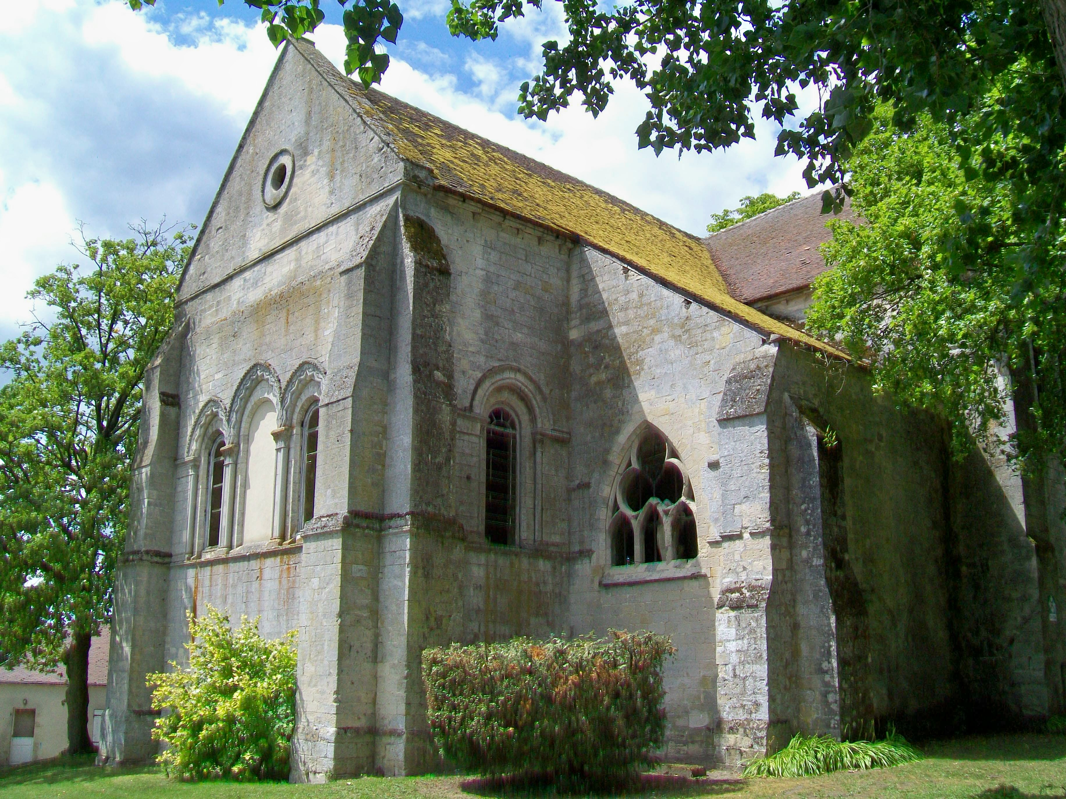 Chapelle ruinée de l'ancien prieuré Saint-Christophe ; chœur et abside nord.